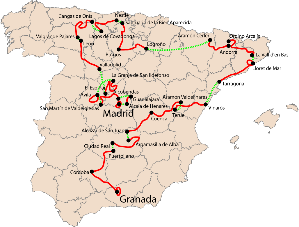 Vuelta a Espana 2005